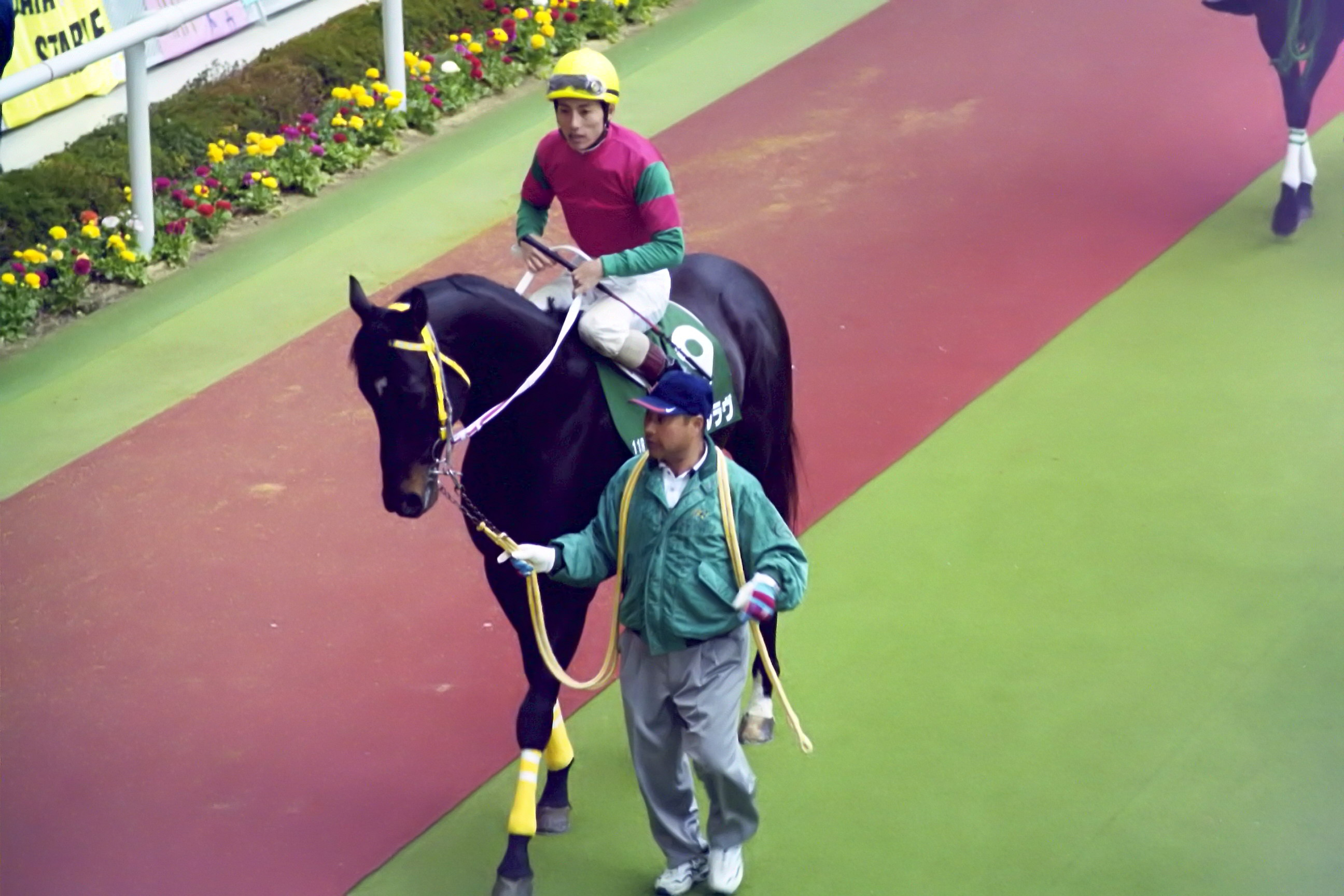 マイネルラヴ号